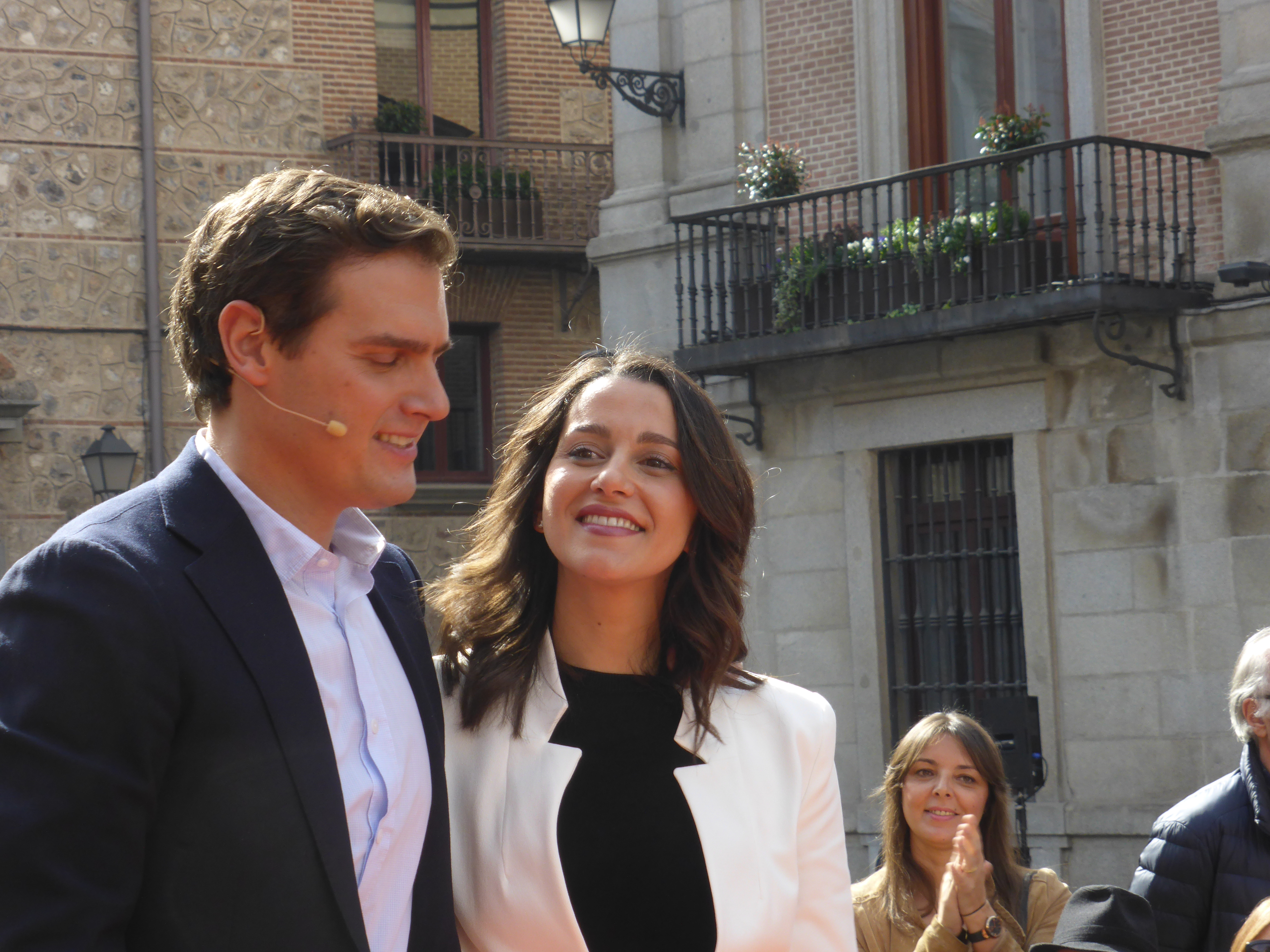 Inés Arrimadas después de anunciar su salto a la política nacional española, en un acto organizado por Ciudadanos en la Plaza de la Villa, en Madrid, el 23 de febrero de 2019. Arrimadas encabezará la lista de Ciudadanos en las elecciones generales (del 28 de abril de 2019), por Barcelona.